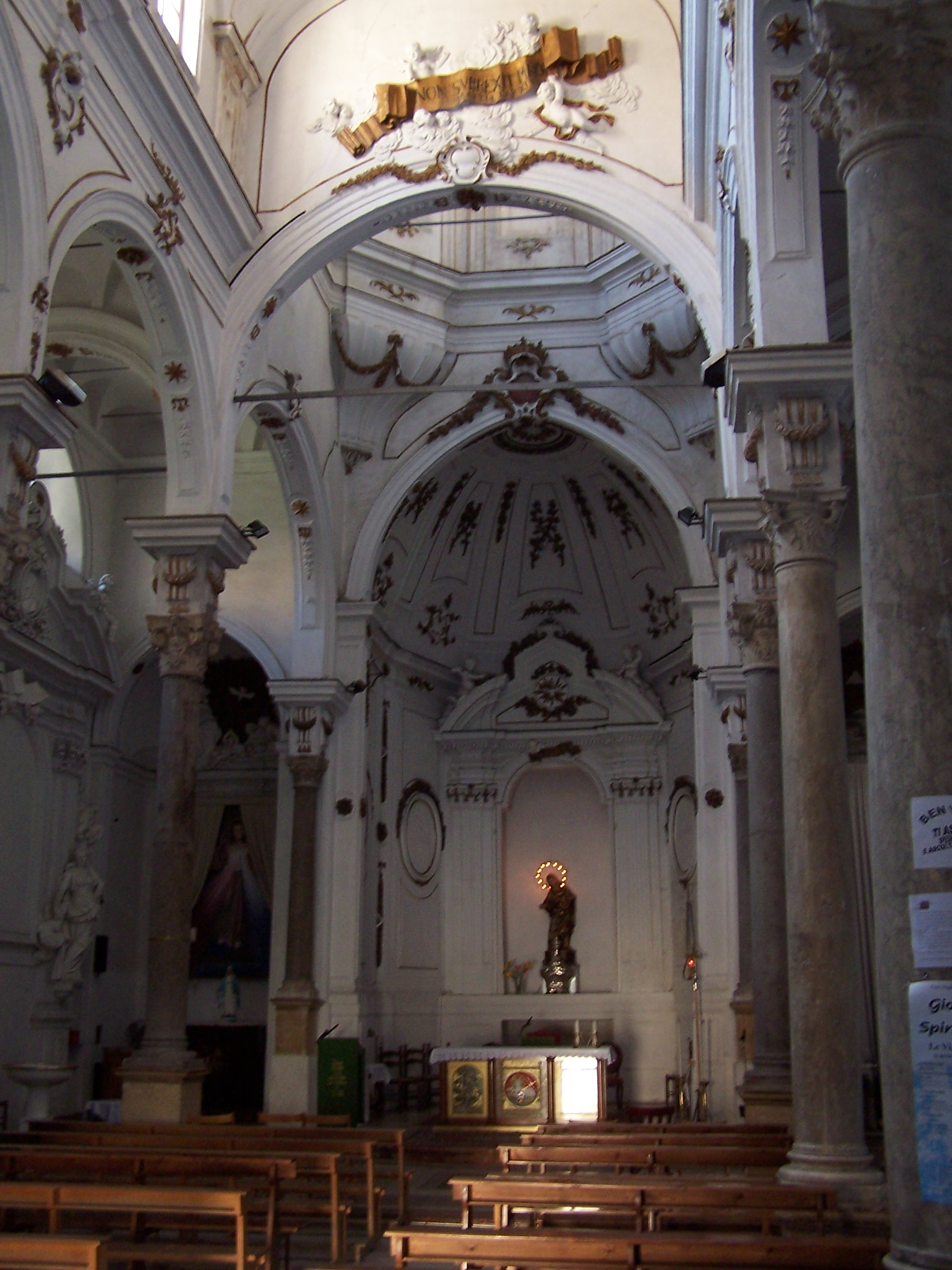 Palermo, la chiesa di San Giovanni dei Napoletani, XVI secolo